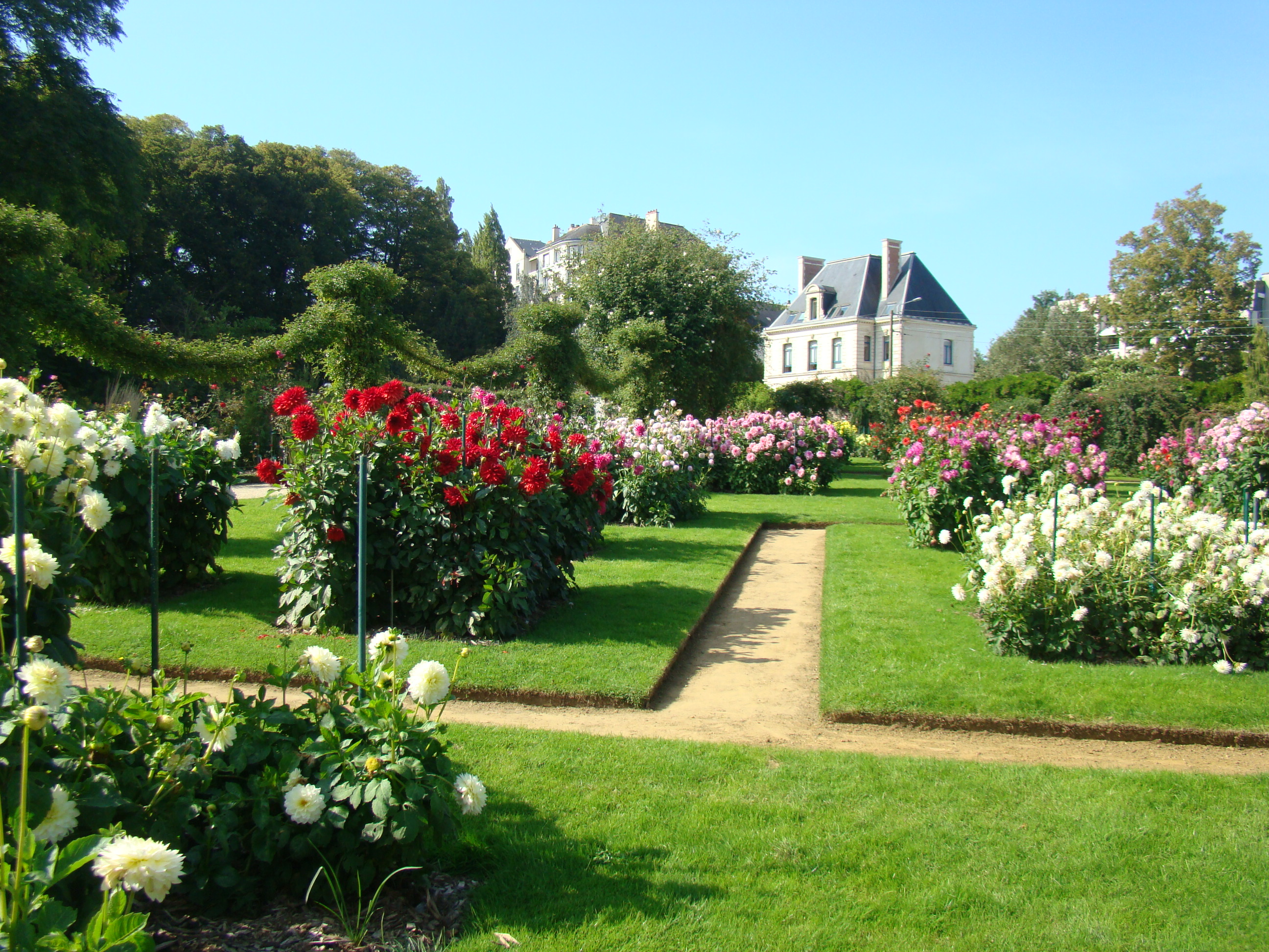 Dahlias au Jardin de Thabor.